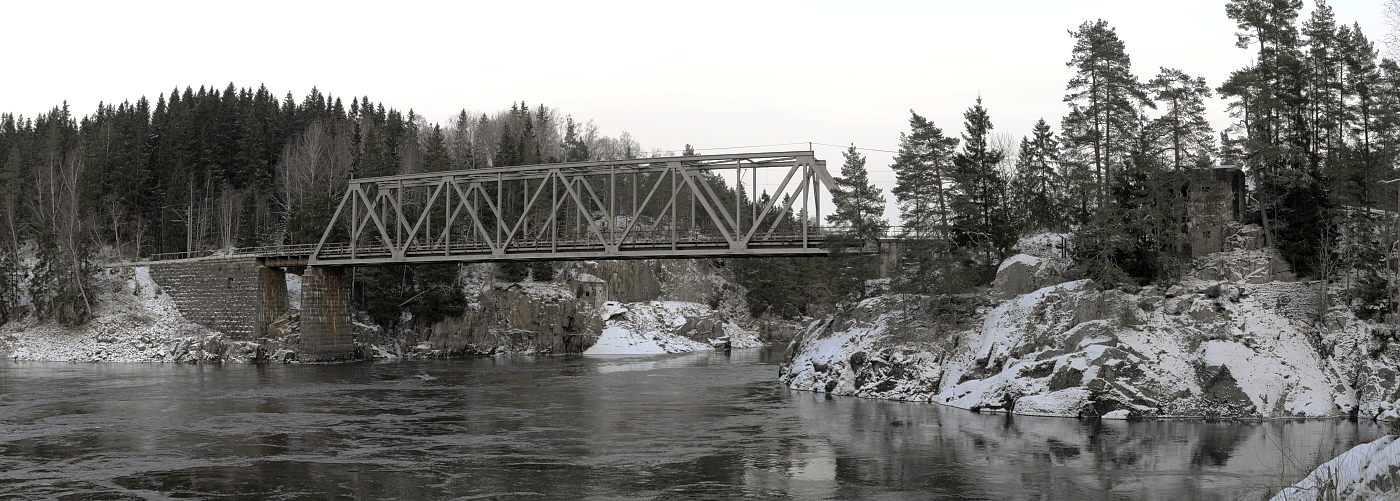 Langenes jernbanebro in Østfold, Norway